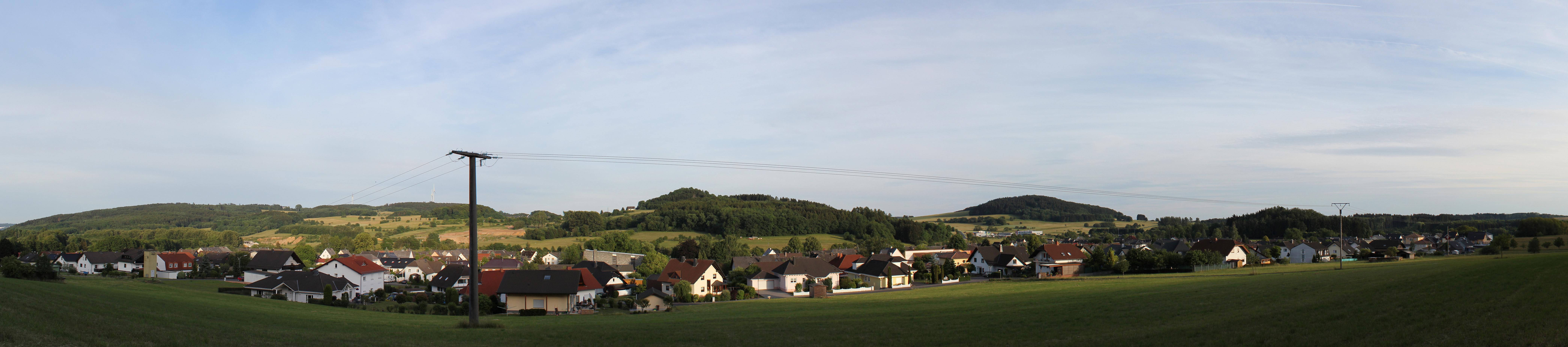 Panoramabild Guckheim, Westerwald NOTE: This image is a panorama consisting of multiple frames that were merged in software. As a result, this image necessarily underwent some form of digital manipulation. These manipulations may include blending, blurring, cloning, and color and perspective adjustments. As a result of these adjustments, the image content may be slightly different than reality at the points where multiple images were combined. This manipulation is often required due to lens, perspective, and parallax distortions.